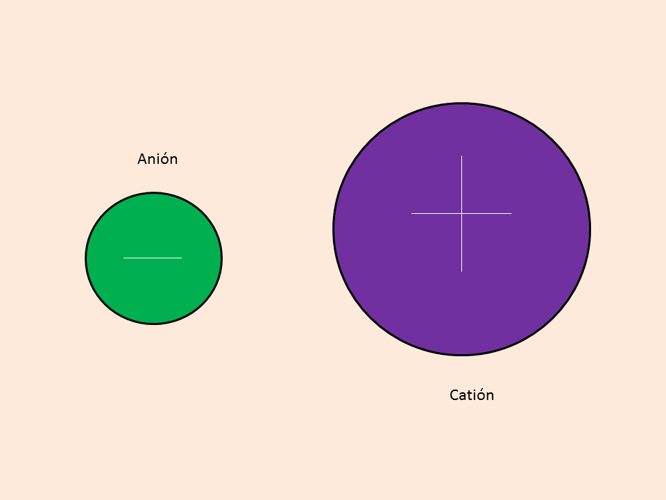 Esto demuestra el catión y el Anión